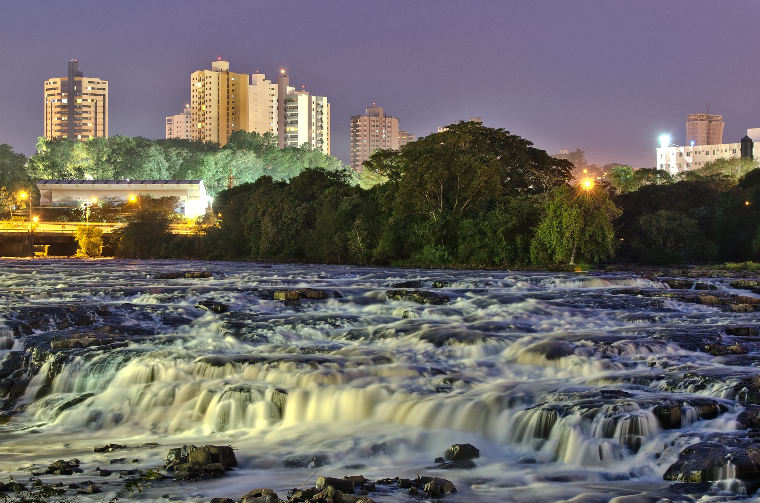 Cachoeira no rio Piracicaba